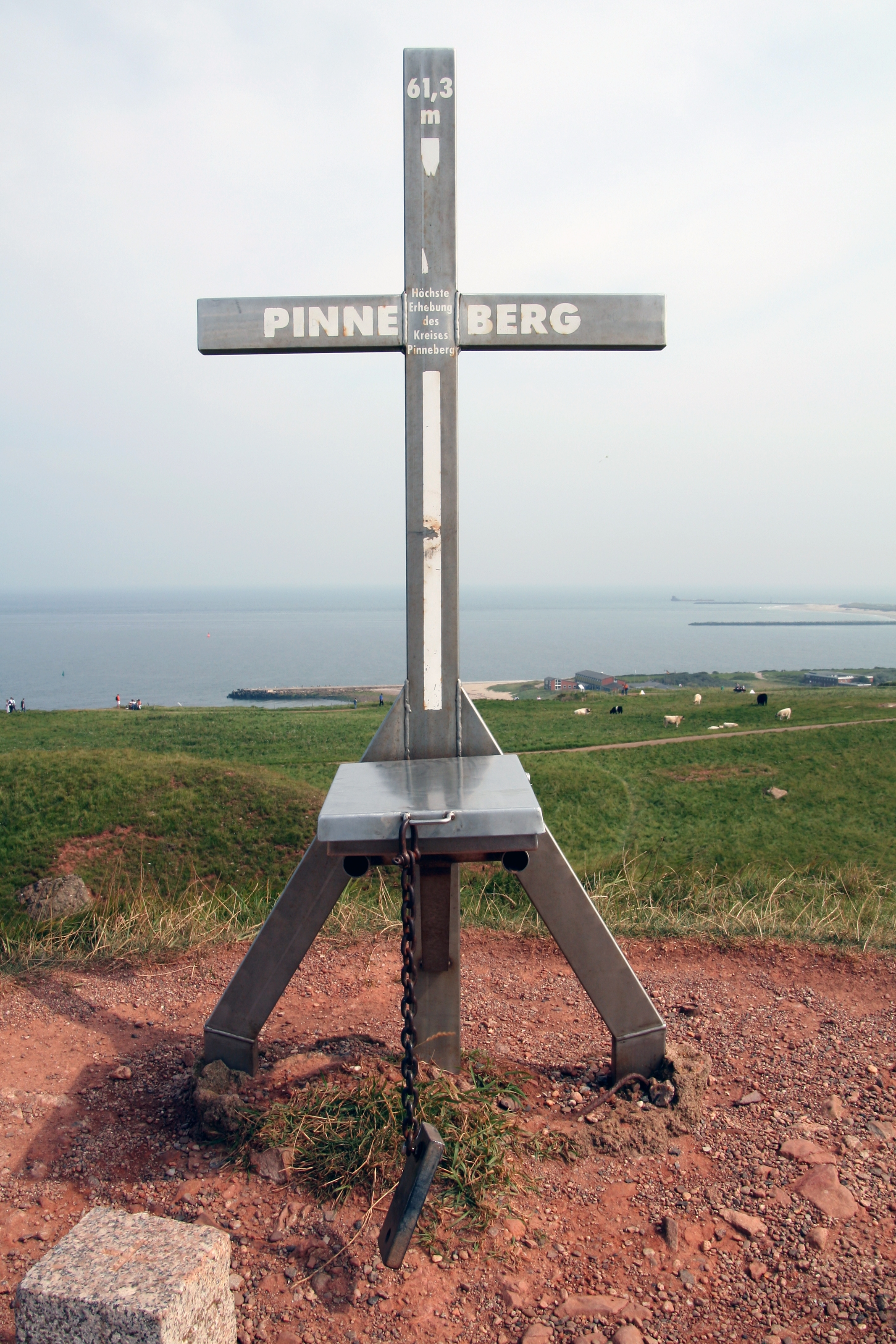 Pinneberg, Helgoland